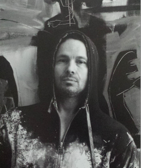 Julien Marinetti - atelier